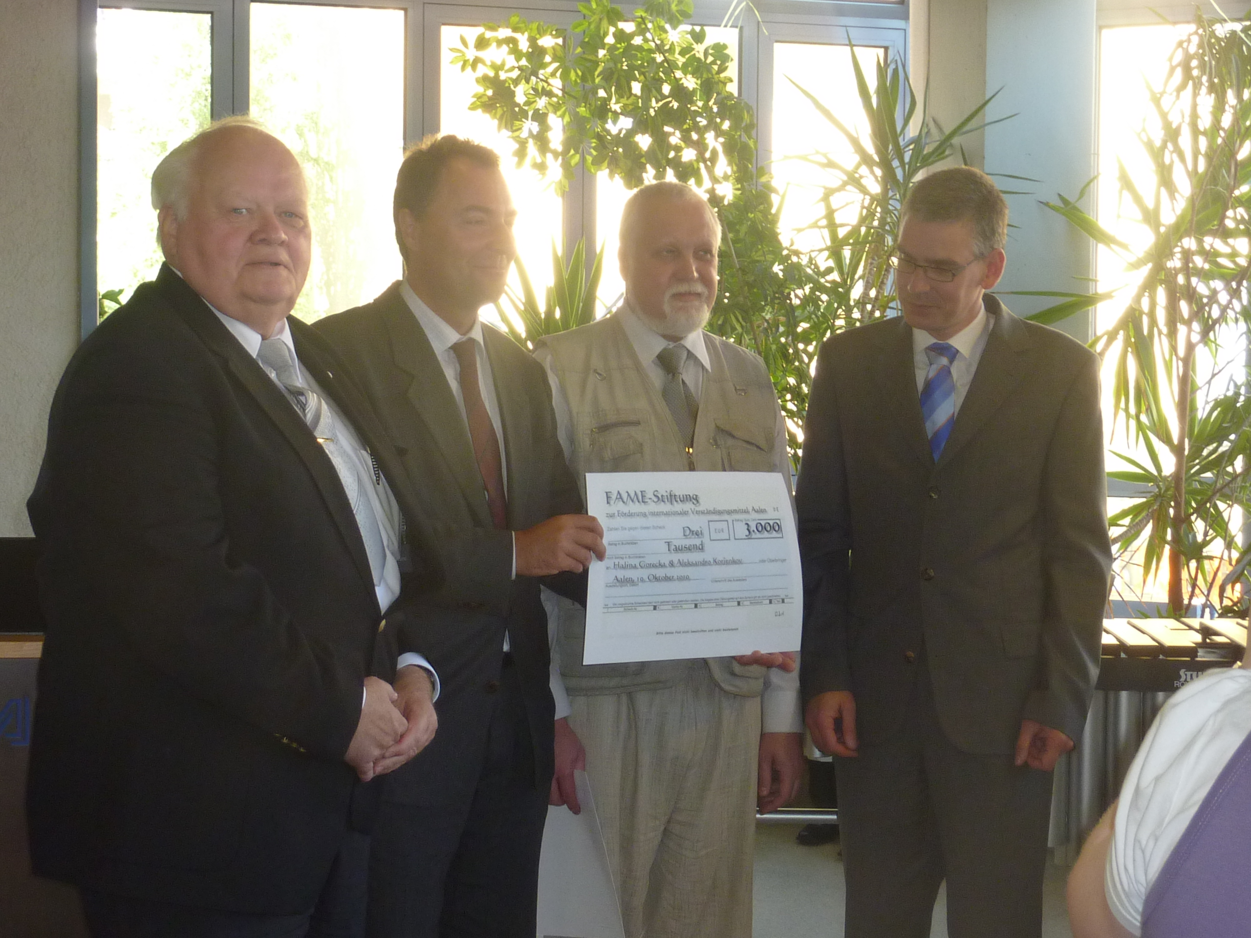 Transdono de la FAME-premio al Aleksander Korĵenkov en la Germana Esperanto-Biblioteko en Aalen la 10-an de oktobro 2010.